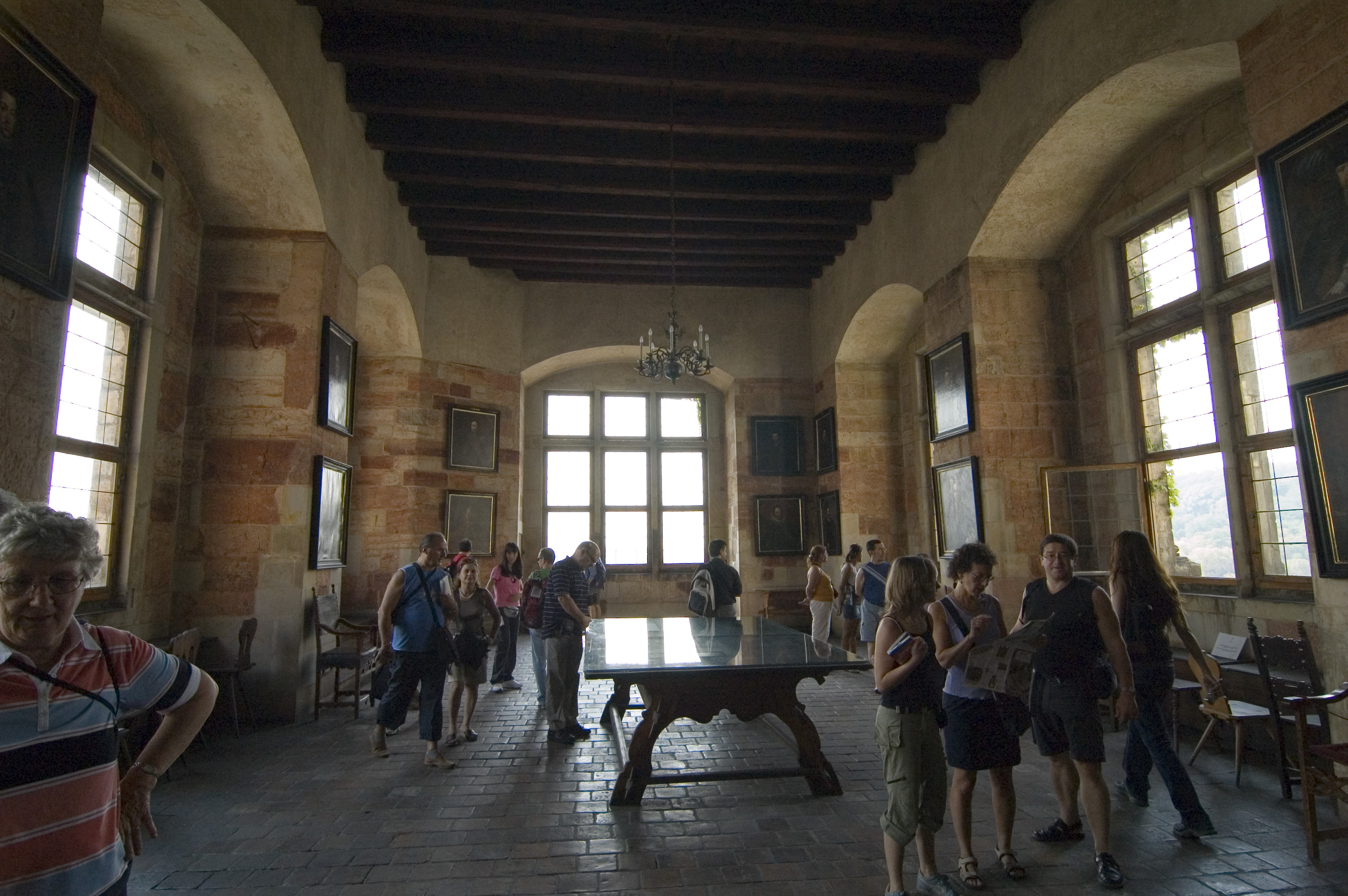 Pražský hrad, Ludvíkovo křídlo, Česká dvorská kancelář